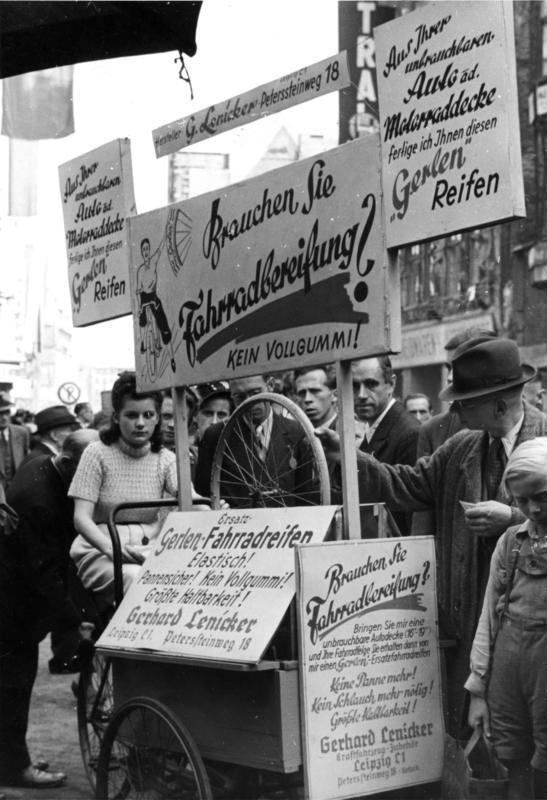 Leipzig, Reklame für Fahrradbereifung Illus-Blunck Leipzig im Herbst 1948. U.B.z.: Eine originelle Strassenreklame in Leipzig, die viele Interessenten anlockte. 2071-48